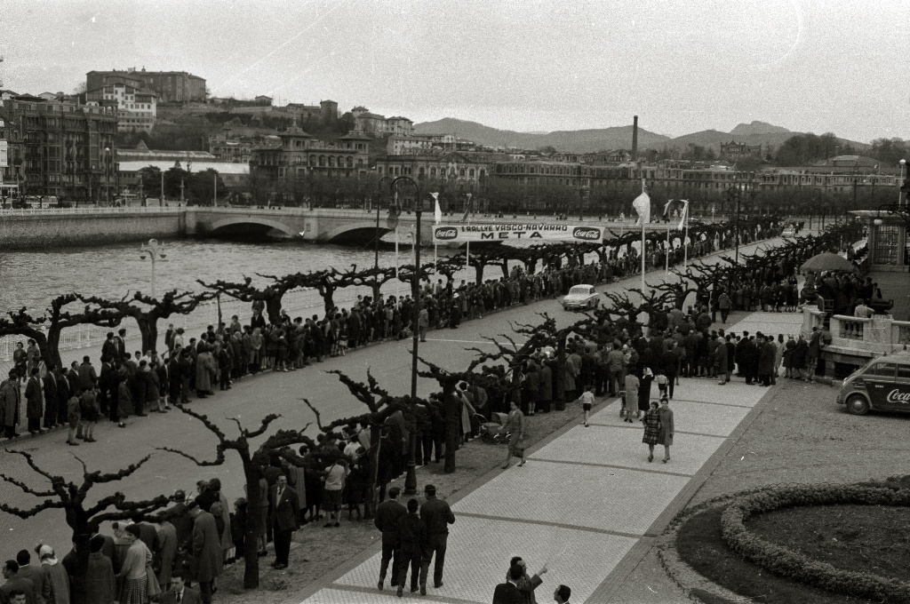 Título original: I Rally Vasco Navarro (11/30) Localización: San Sebastián (Guipúzcoa)